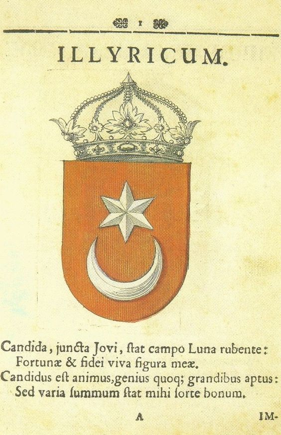 Simbol Ilirov